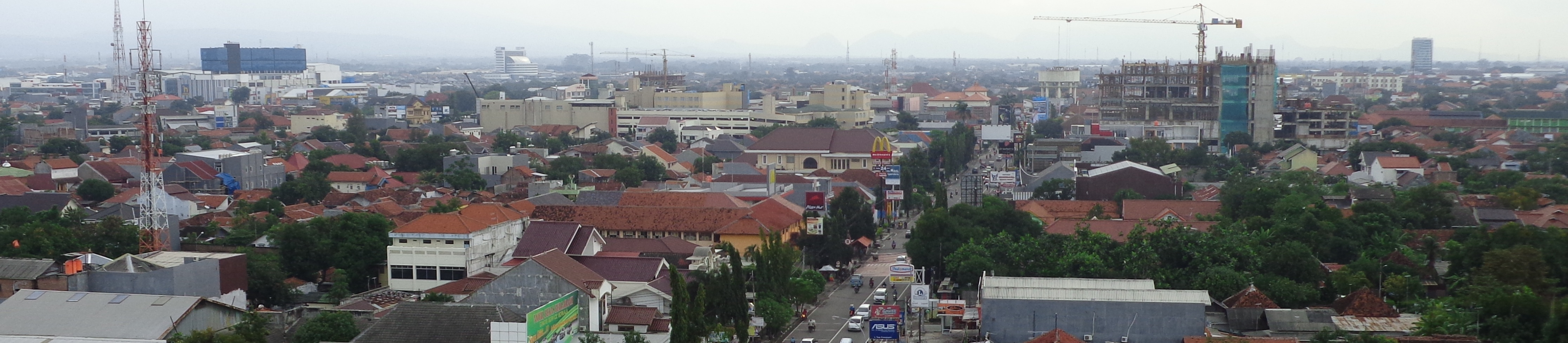 Panorama Kota Cirebon